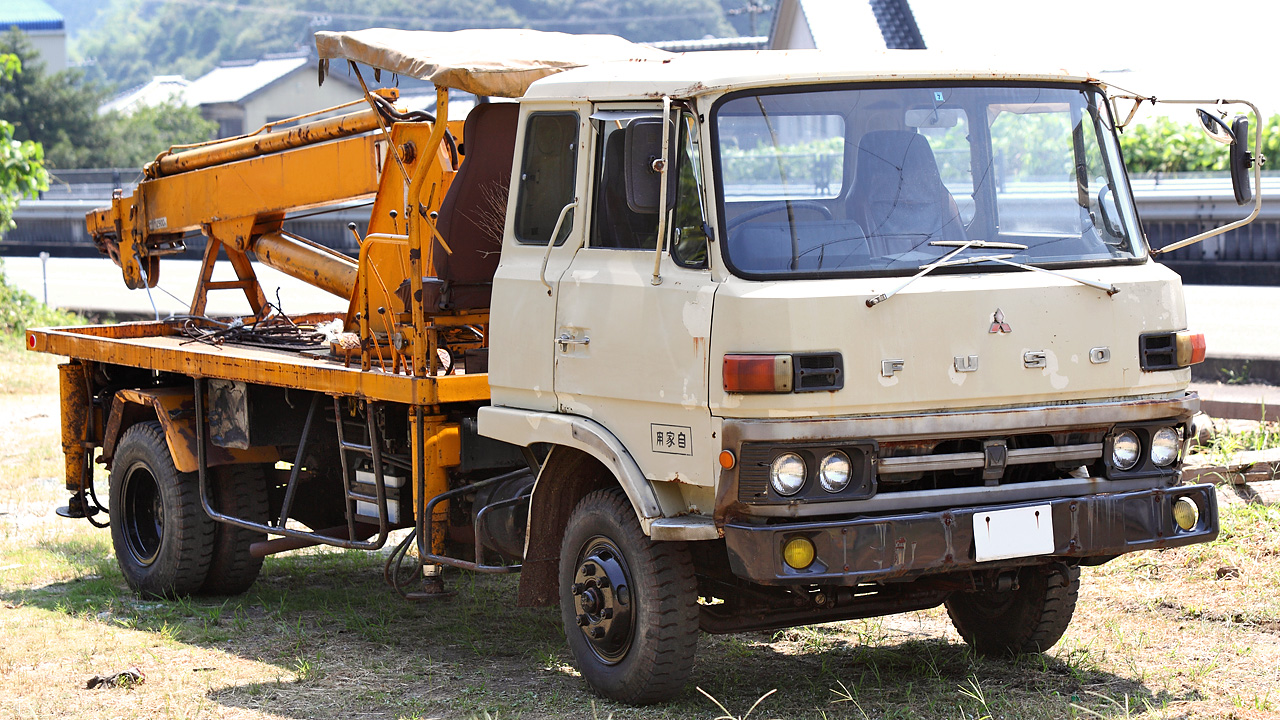 Fuso FK.